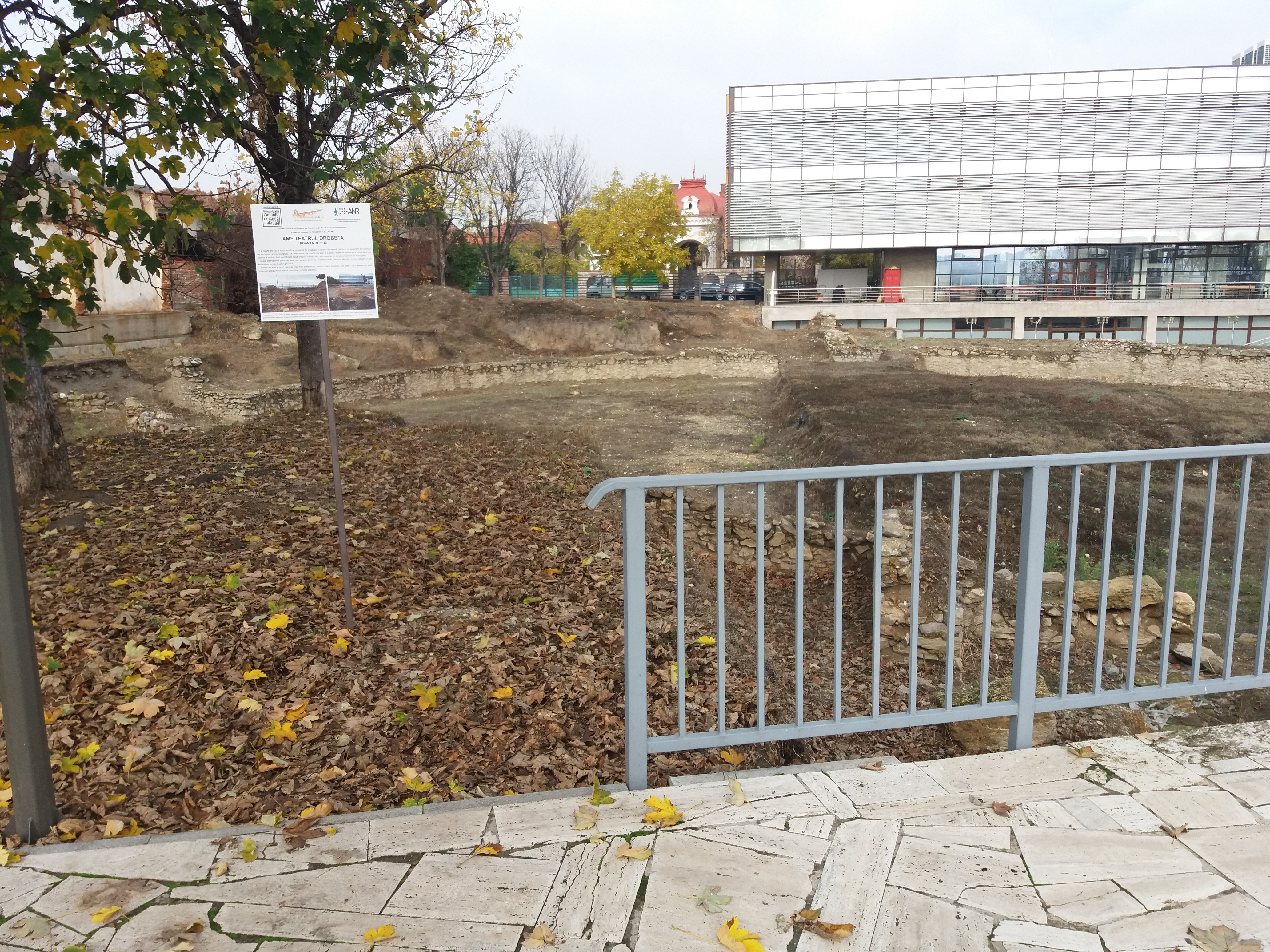 Castrul roman Drobeta 05